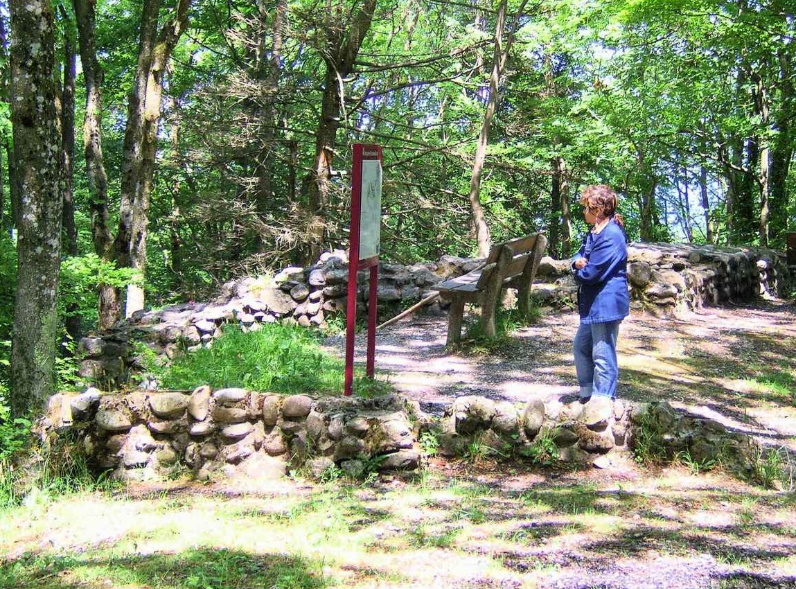 Ruine Schnabelburg